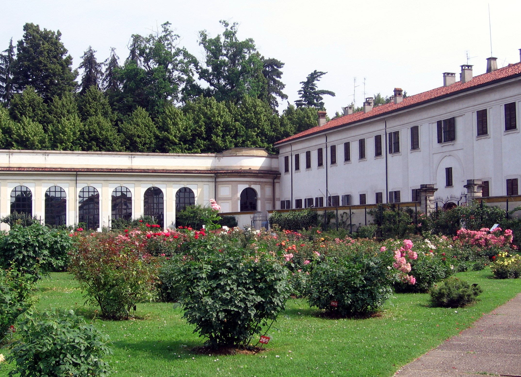 Roseto in fiore alla Villa Reale di Monza